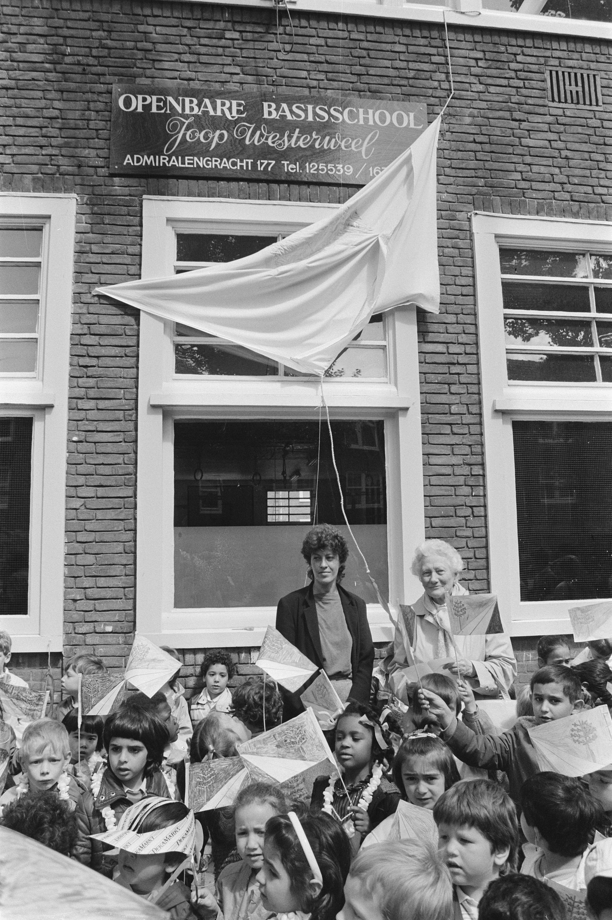 Collectie / Archief : Fotocollectie Anefo Reportage / Serie : [ onbekend ] Beschrijving